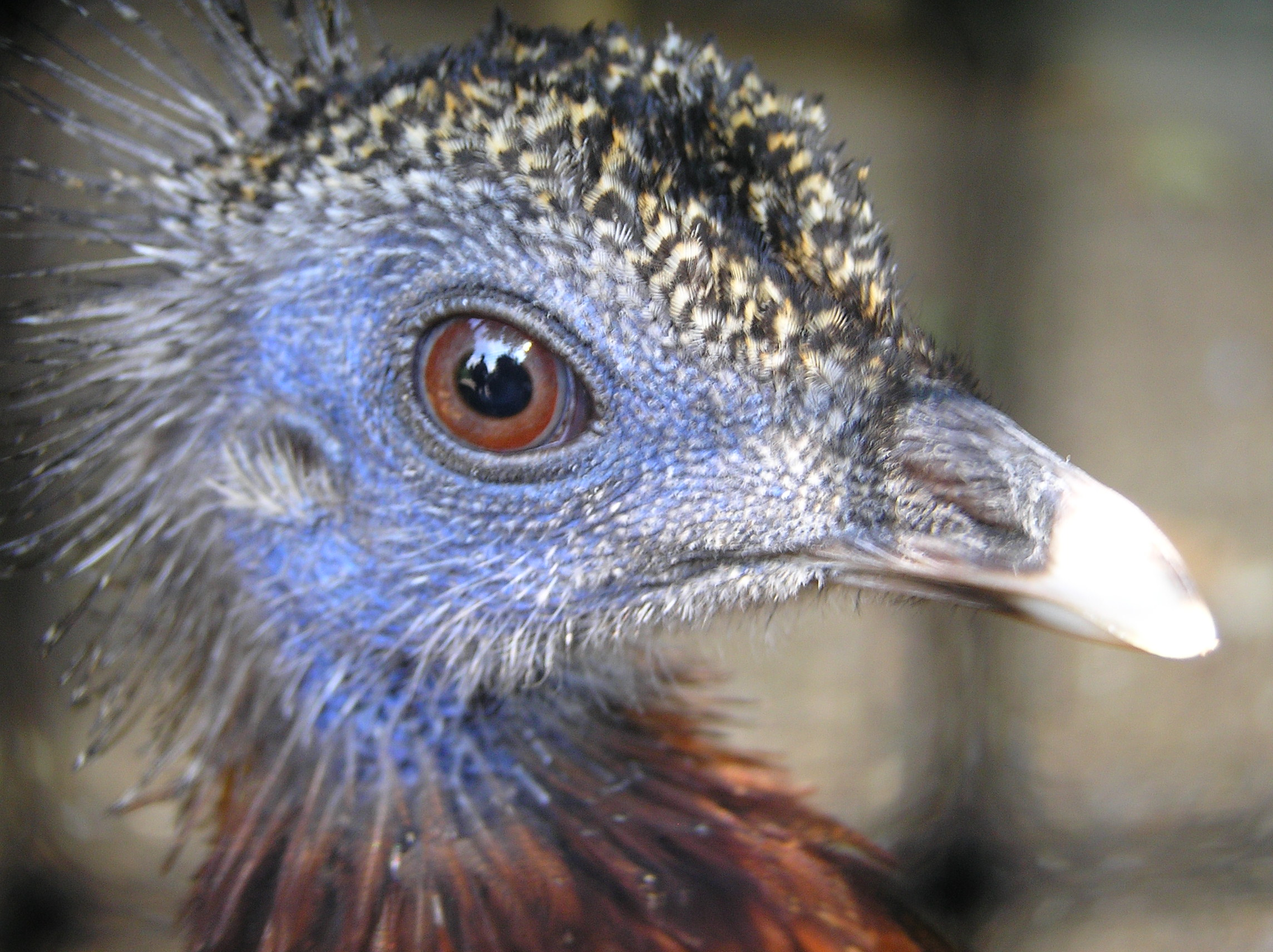 Female - adult - Argusianus argus argusArgusianus argus argus (linnaeus)